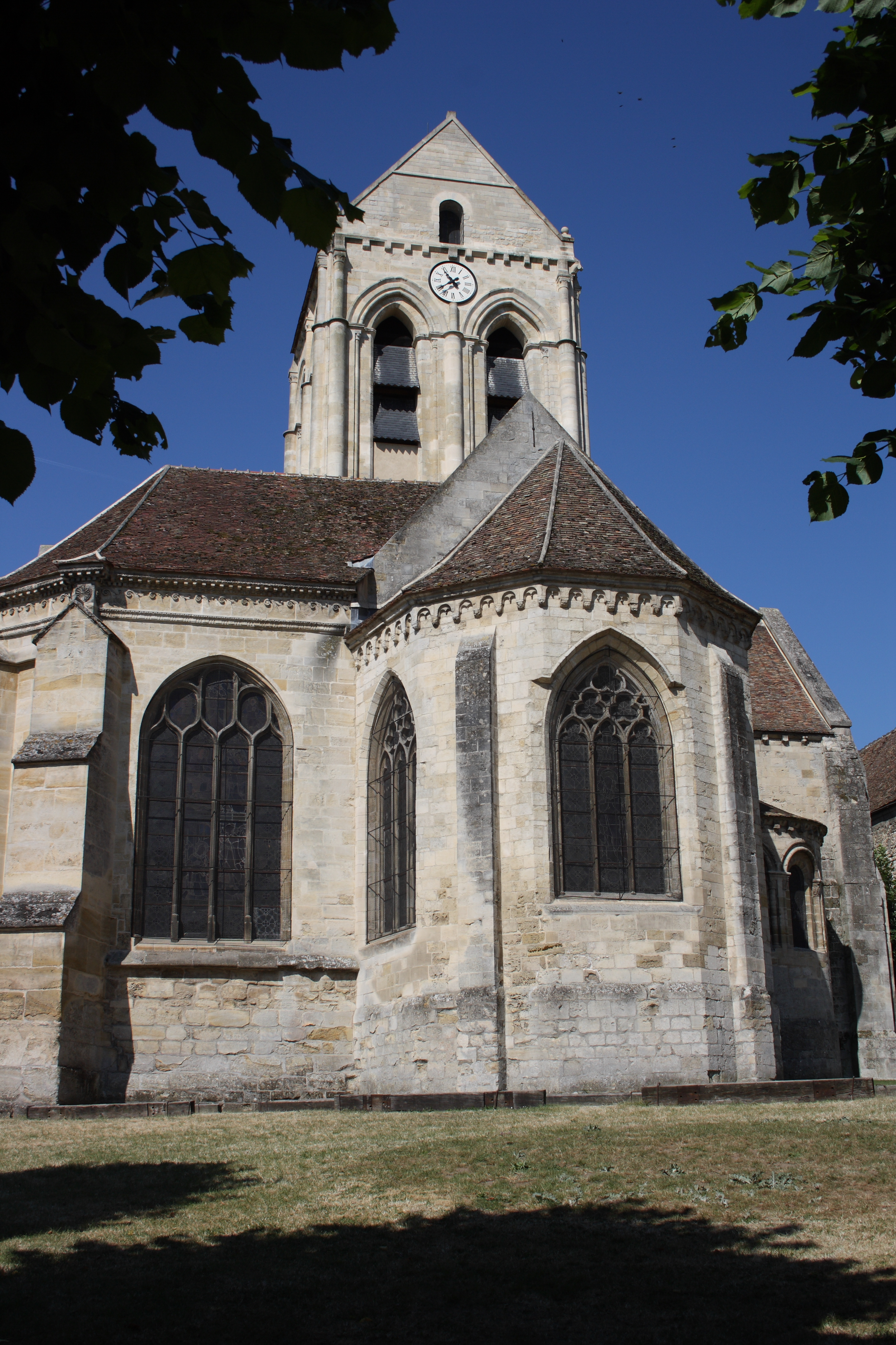 Katholische Pfarrkirche Notre-Dame-de-l'Assomption in Auvers-sur-Oise im Département Val d'Oise (Île de France), erbaut im 12./13. Jahrhundert, Ansicht von Osten